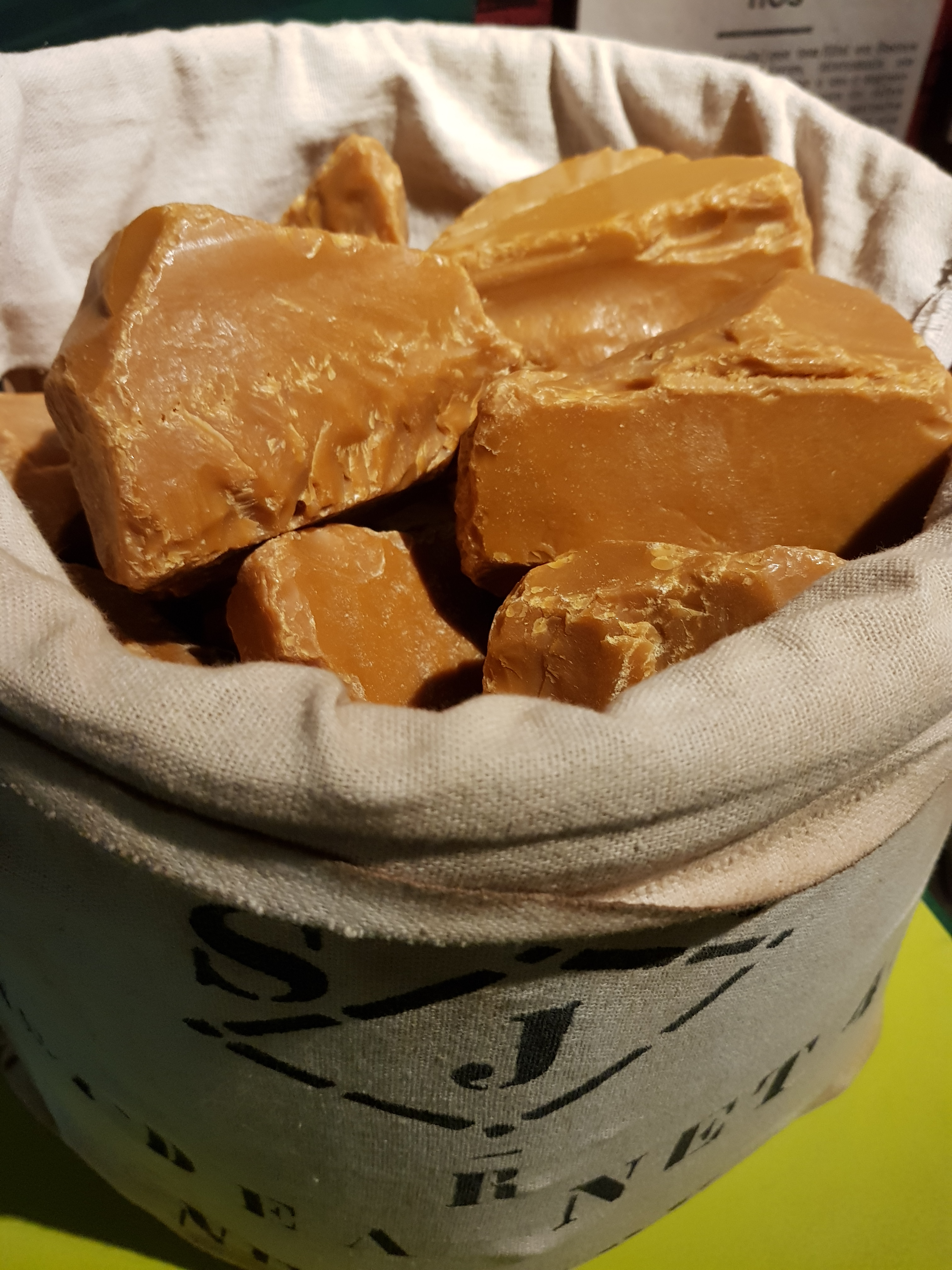 Amosta de cera de carnaúba em exposição no Museu da Indústria, Fortaleza, Ceará